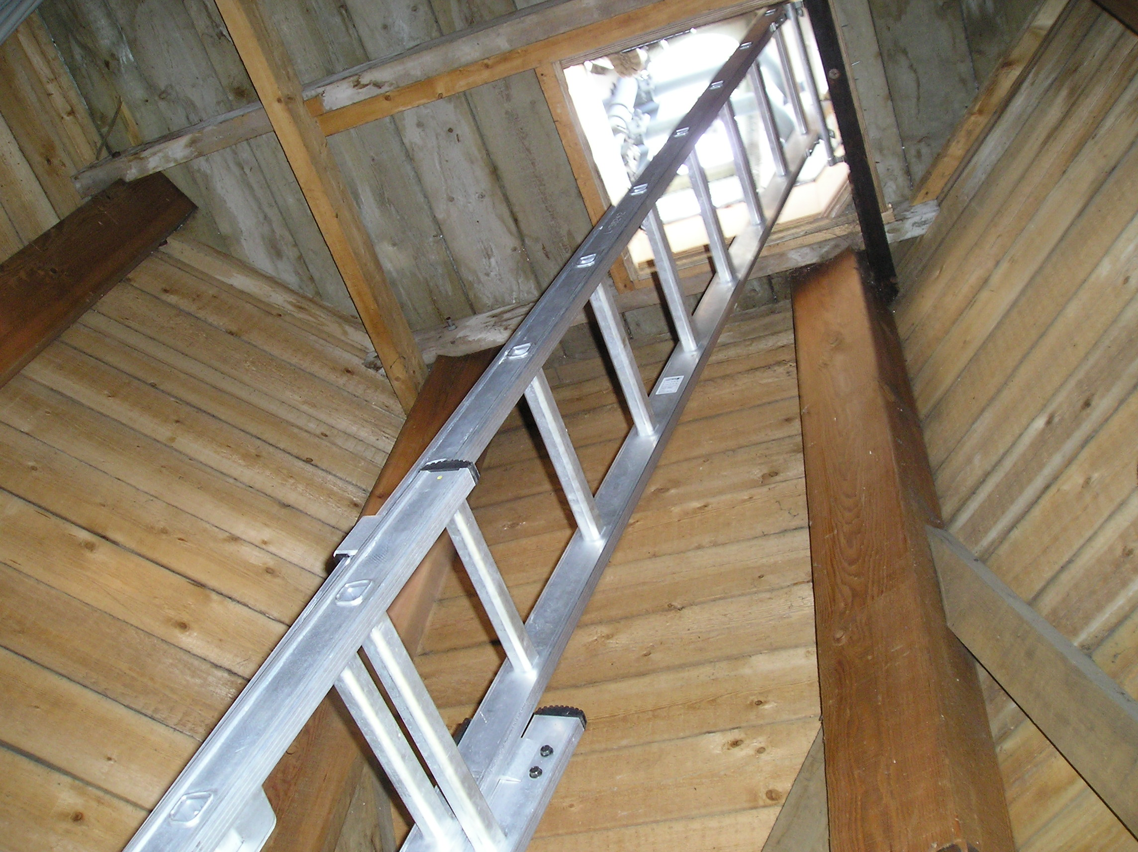 Sint Elisabethskerk Grave - gewelven - ladder naar toren